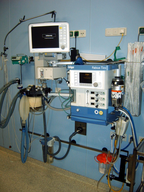 Autor: M.Ansorena, selbst aufgenommen Bildname:Narkosegerät Wann: 08/2005 Wie: Digitalkamera